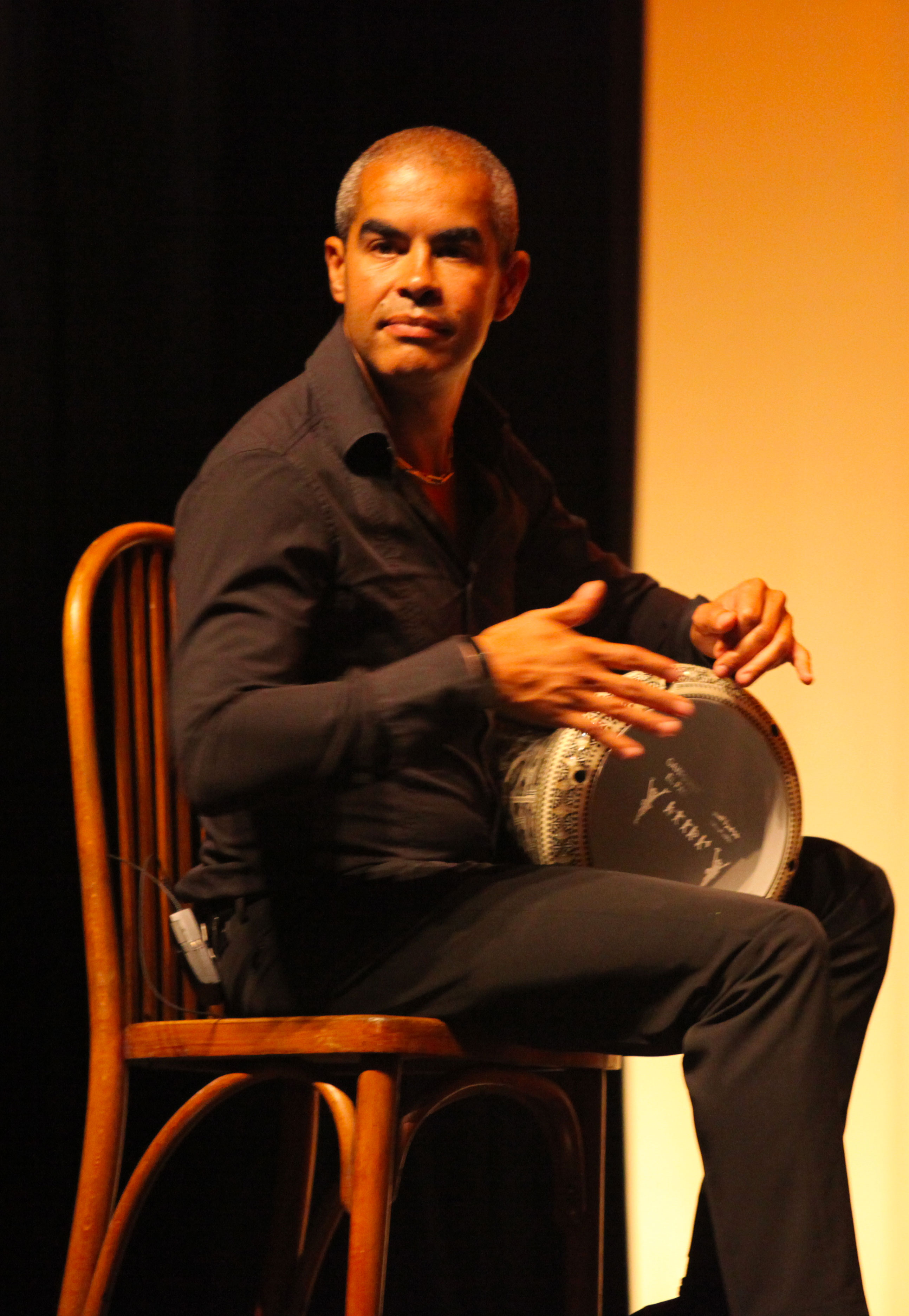 Djamel Mellouk compositeur et professeur de darbouka spécialiste de la musique arabe Paris / Vernon 27200 France / Directeur artistique de la compagbie Mille et Une Nuits